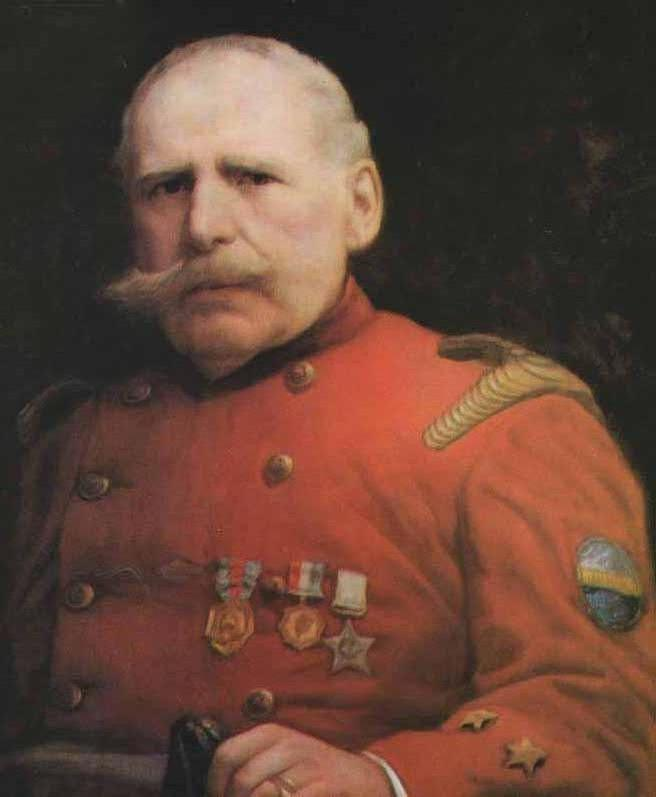 Jose Luis Claro Cruz